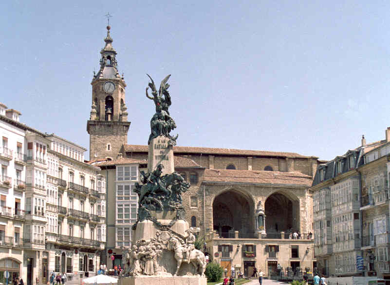 Plaza de la Virgen Blanca en Vitoria-Gazteiz (España). Tomada por JMSE el 5 de julio de 2003 y cedida a Wikipedia.